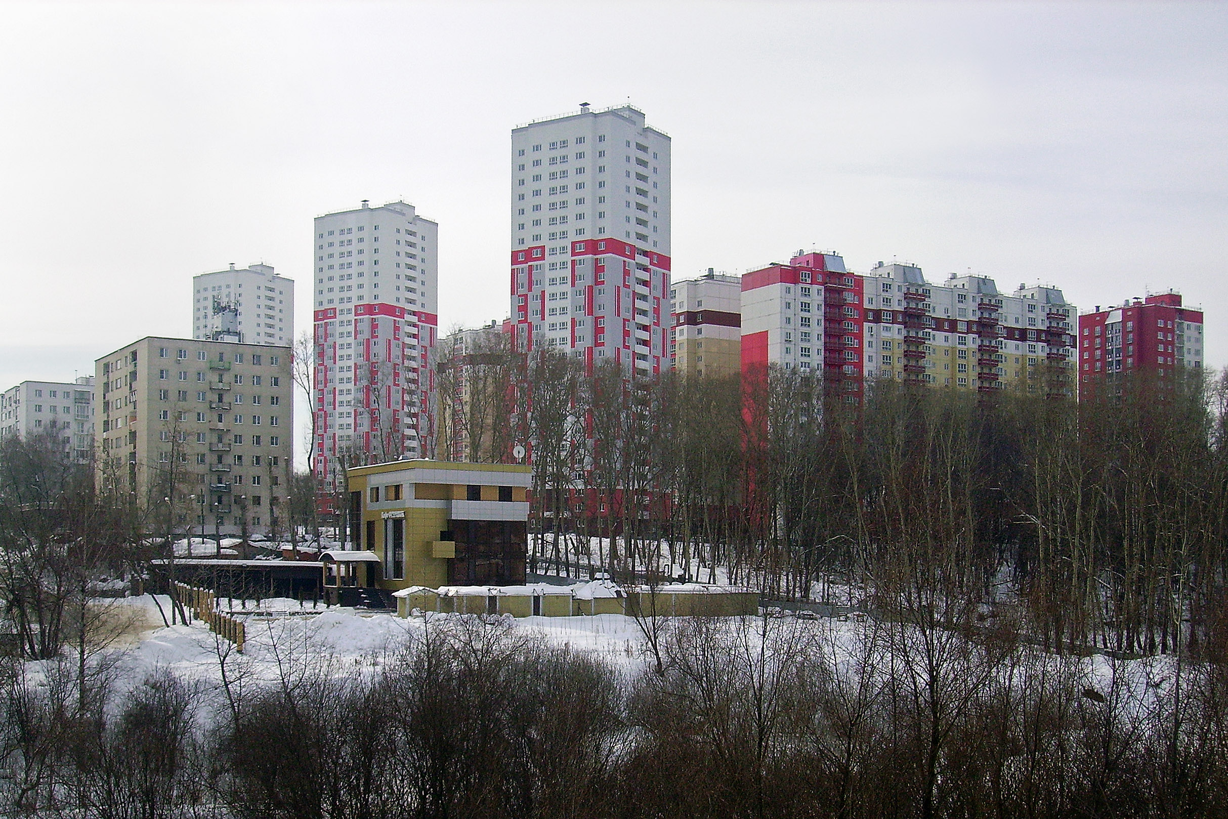 Нижний Новгород. Новый жилой комплекс "Белый Город" в Советском районе города